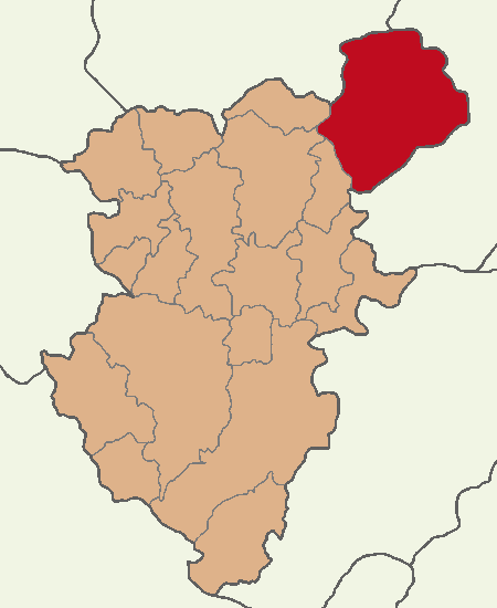 Çivril ilçesinin konumu